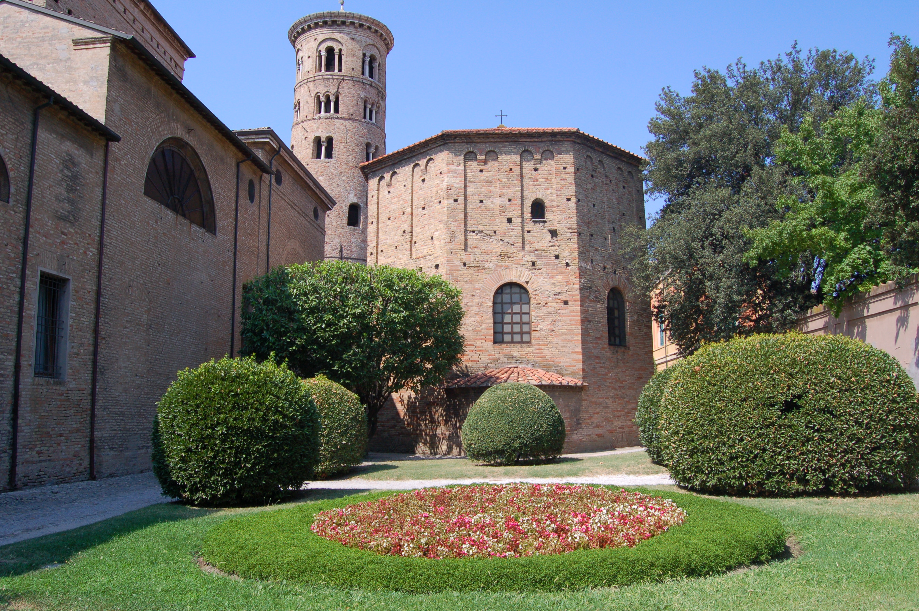 Basilica di Sant'Apollinare in Classe This is a photo of a monument which is part of cultural heritage of Italy.